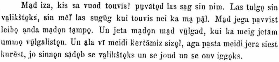 Pater noster prayer in western Livonian